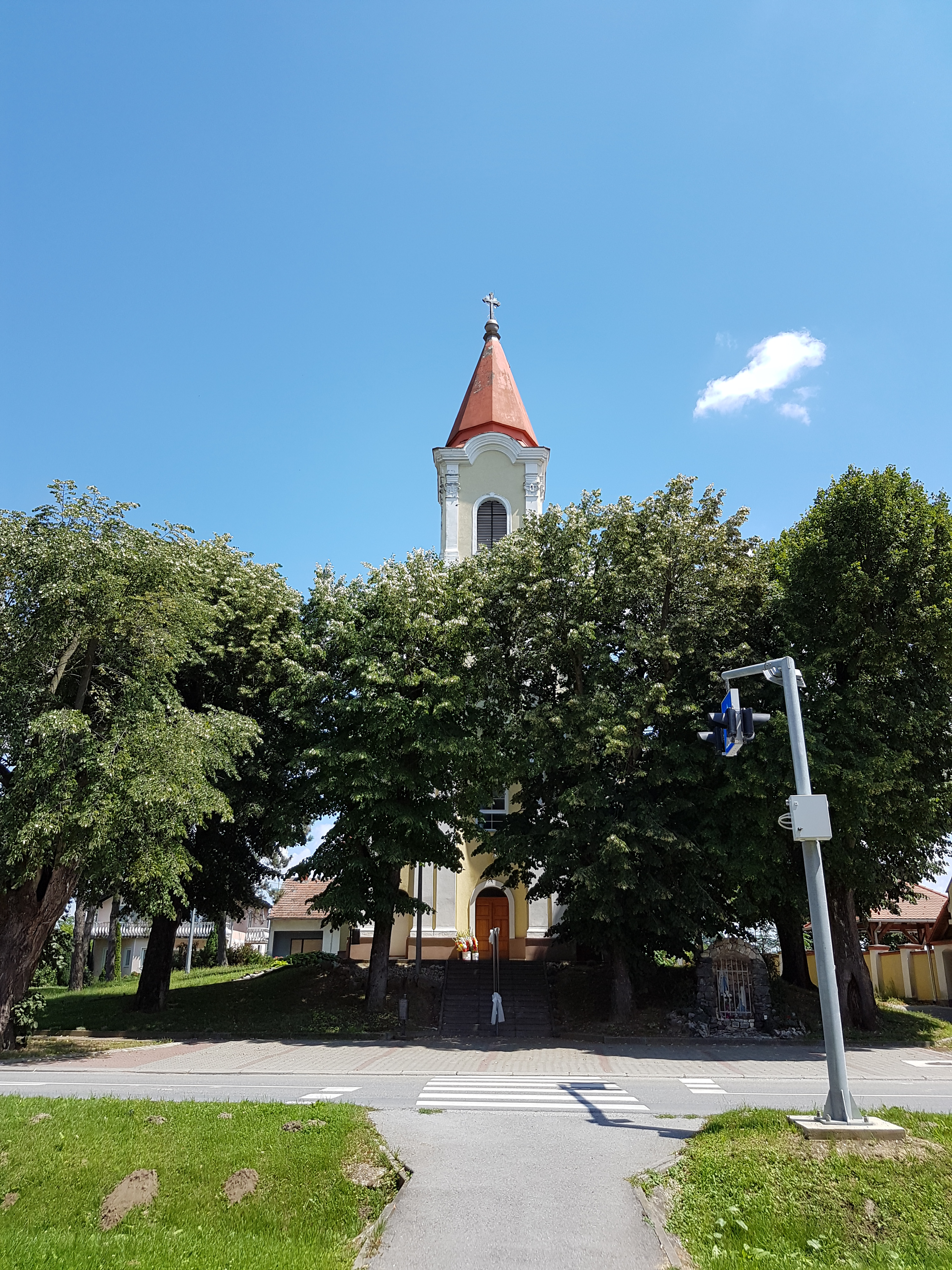 Župna crkva svetog Ivana Krstitelja u Špišić Bukovici izgrađena 1753. godine, (klasicistički stil)